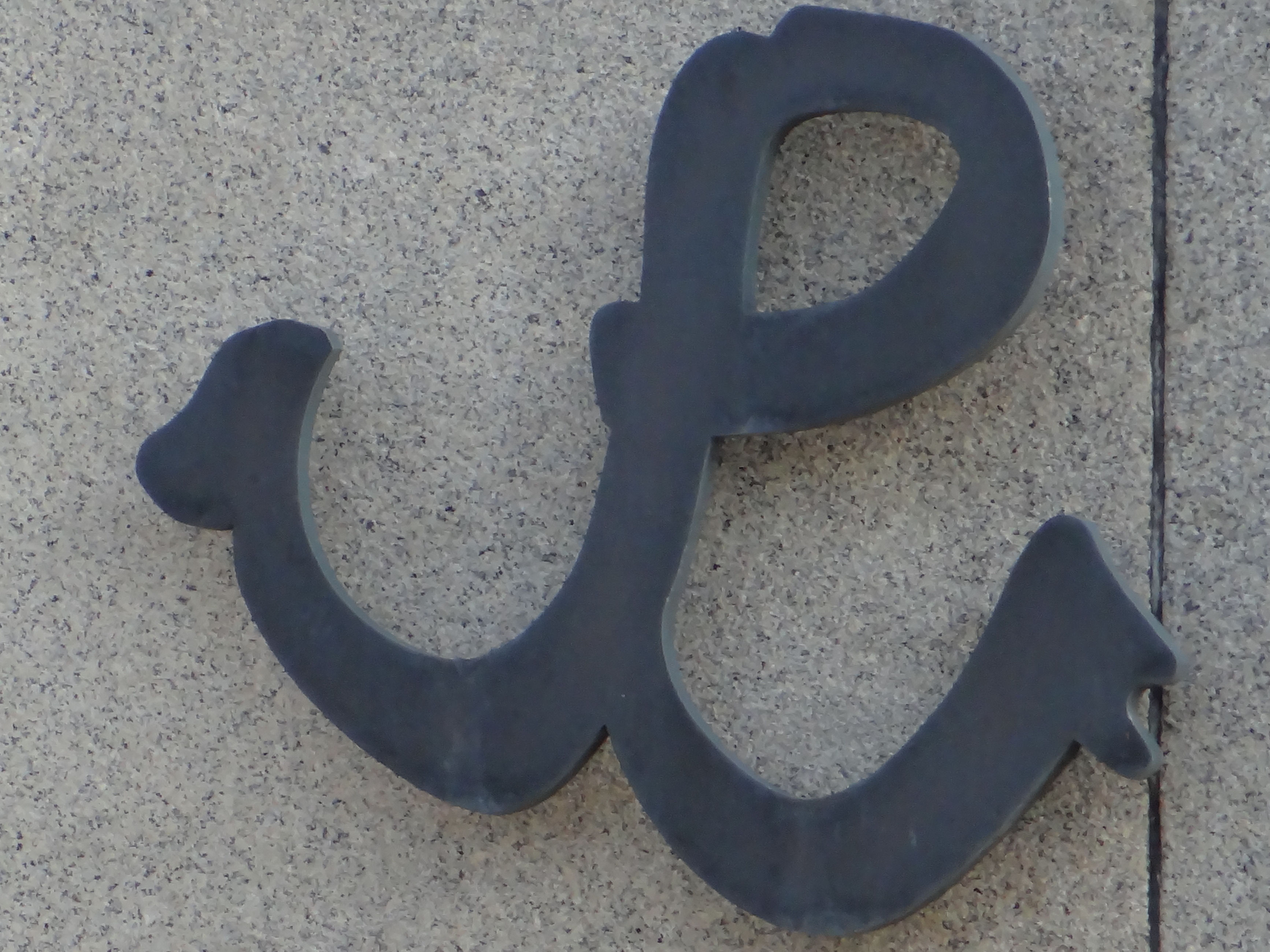 Pomnik Lotnika w Warszawie - u zbiegu ul Wawelskiej z Żwirki i Wigury - symbol "małego sabotażu" - kotwicy Polski Walczącej umieszczonej przez Janka Bytnara na pomniku "pod nosem" okupanta